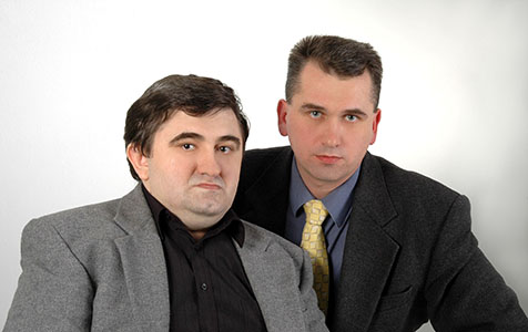 Письменники Олег і Валентин Авраменки